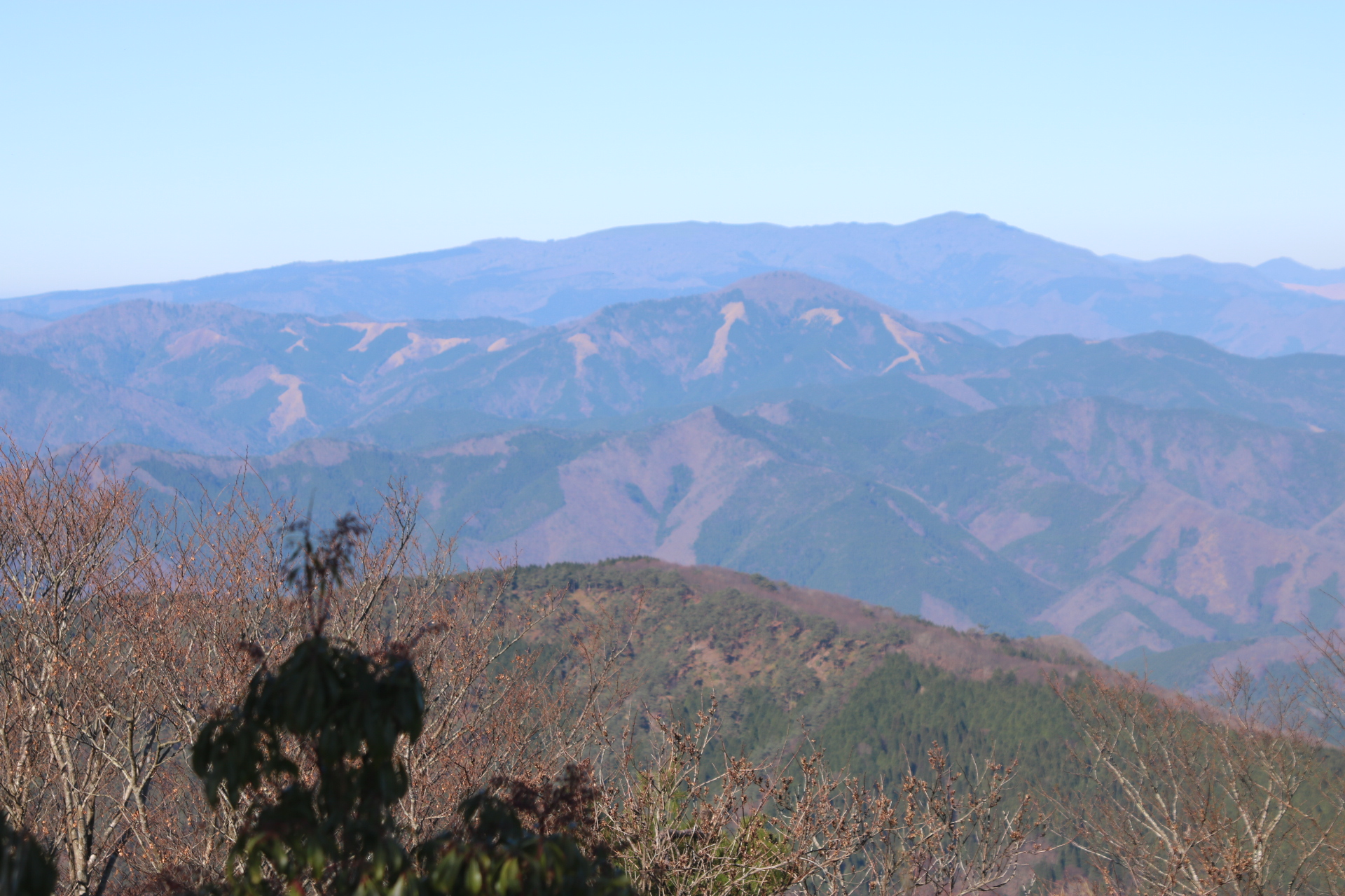 兵庫県の千町ヶ峰から見た氷ノ山（右奥）